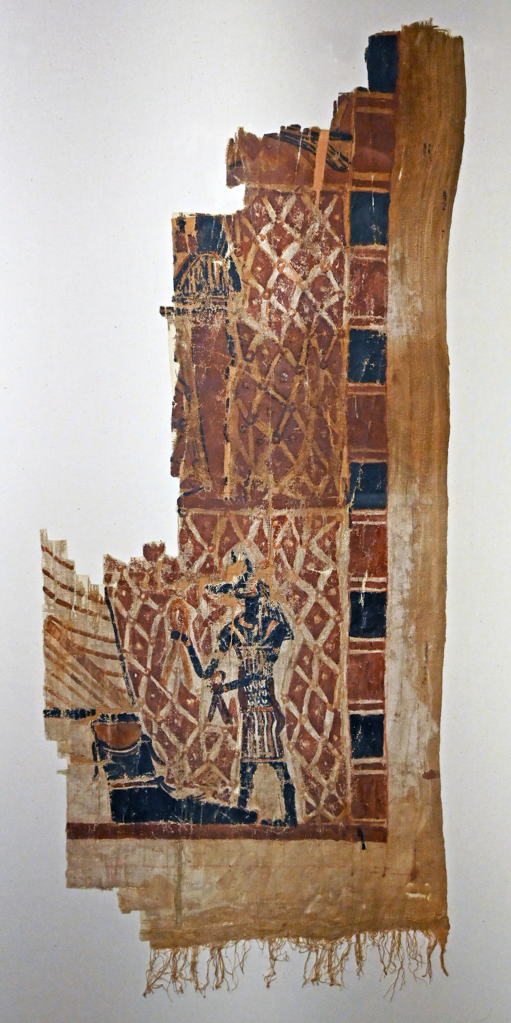 Teil eines farbig bemalten Leichentuchs, Abusir el-Meleq (?), 2. Jh. n. Chr. Erhalten ist die rchte untere Ecke mit die Darstellungen von Fuß und Kleidung eines stehenden Toten sowie Anubis mit Binden in den Händen, darüber ein Sohn Horus'. Ausgestellt im Museum der Universität Tübingen MUT, Inventarnr. 343.